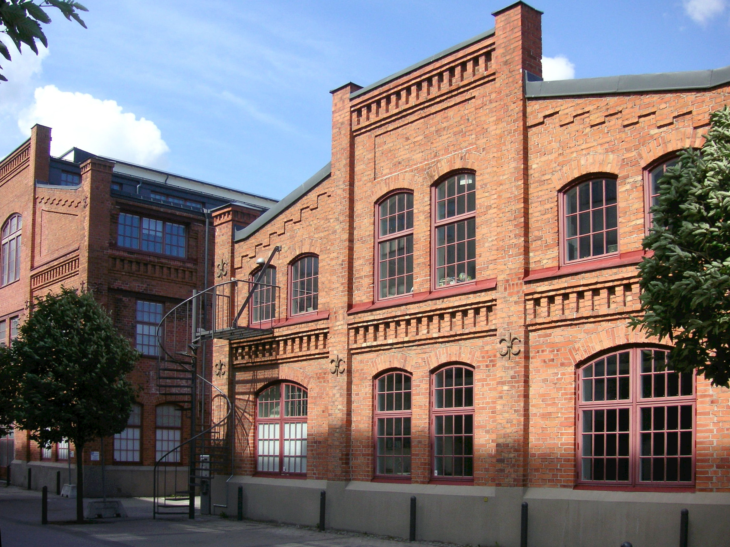 Lilla Essingen, Kungsholmen, Stockholm, äldre industribebyggelse